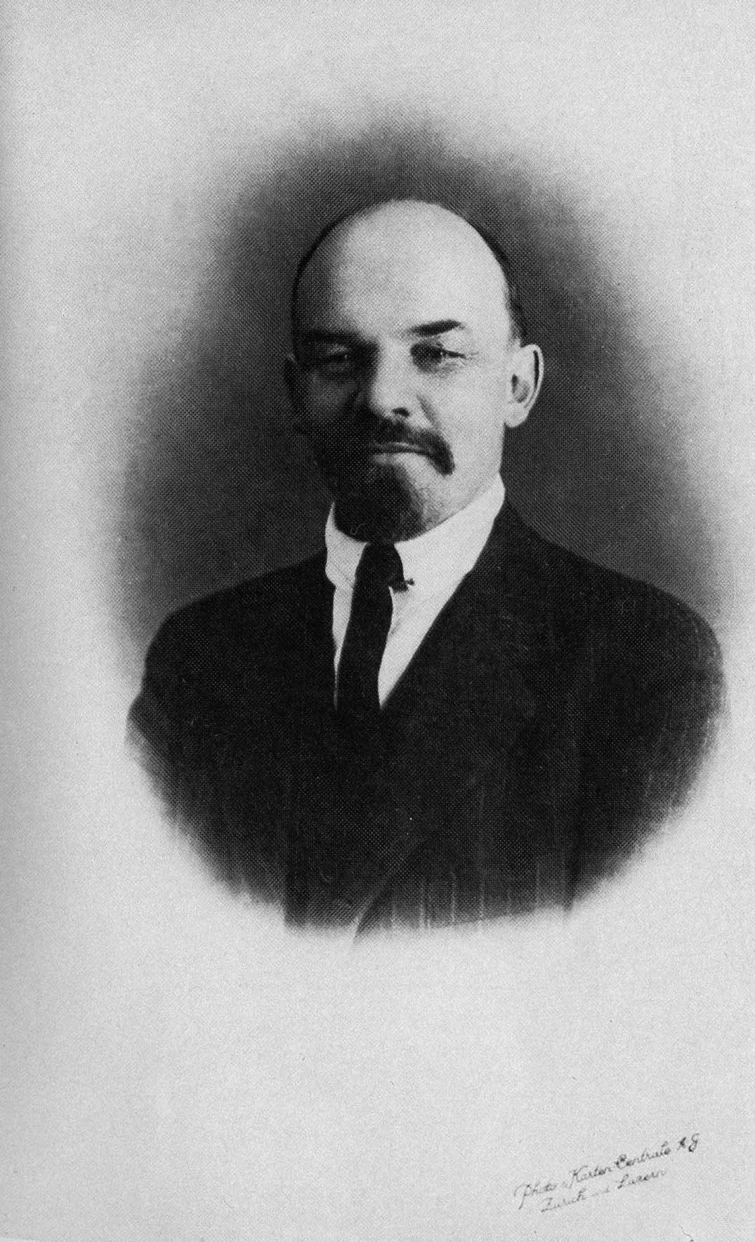 В.И.Ленин. Портрет. 1916 г., не ранее 28 января (10 февраля) - не позднее 28 февраля (12) марта. Цюрих, Швейцария. Позитив-оригинал. 9 х 13,6 см. Фотограф: В.Плиер